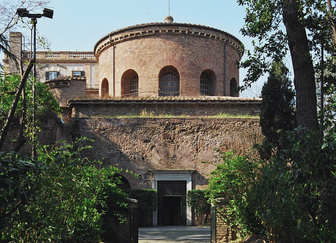 descripció Mausoleu Santa Costanza. Roma. Vista exterior